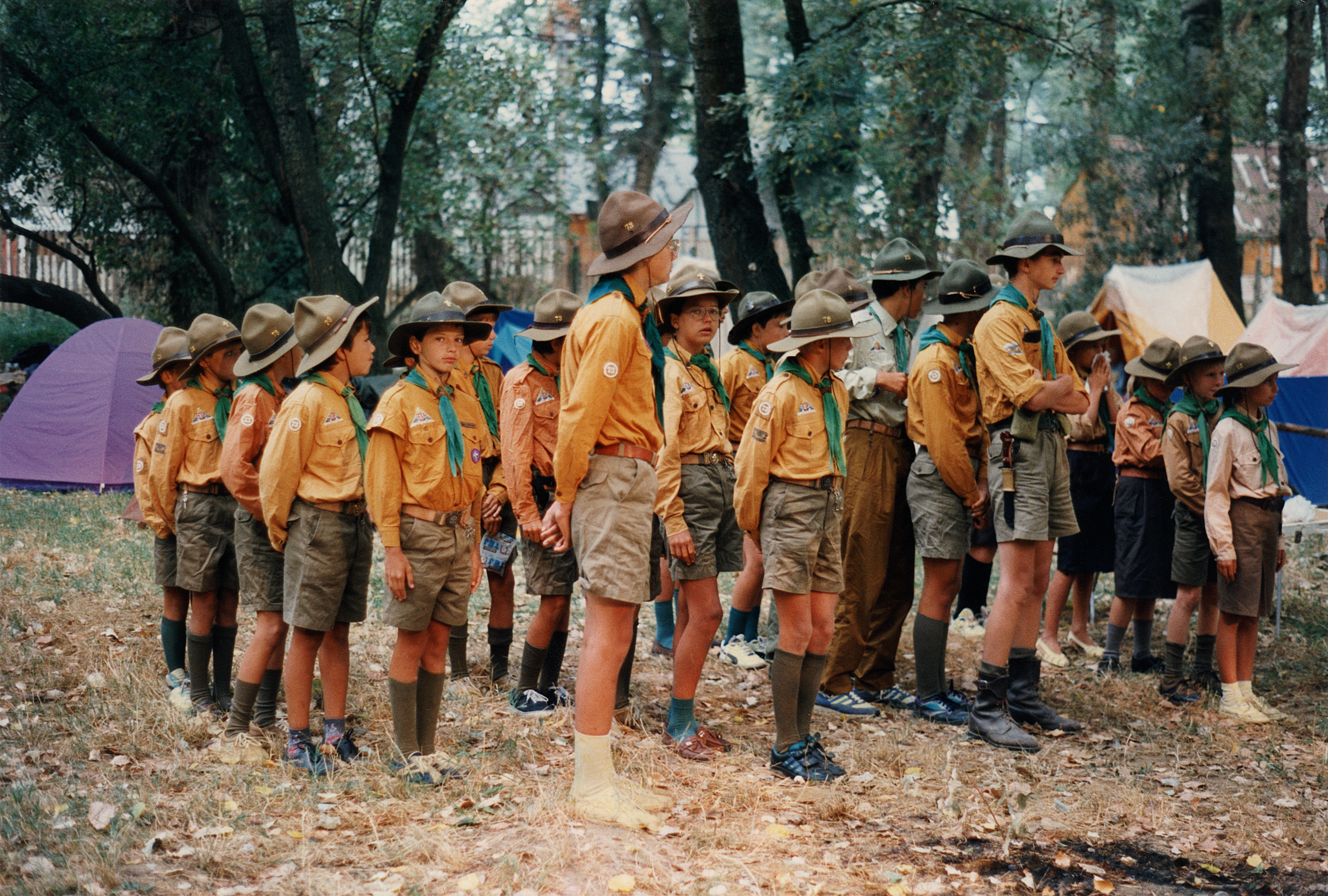 Großfahrt des Pfadfinderstammes Ägypten mit den ungarischen Pfadfindern der 73. Abteilung „Weißer Hirsch“ aus Tapolca. Über eine Woche lang fuhren beide Gruppen im Sommer 1992 entlang des nordostungarischen Oberlaufs der Theiß von Tiszabecs nach Gergelyiugornya. Anschließend gestaltete der Stamm Ägypten sein eigenes Programm. Ausgangspunkt war dabei stets das Anwesen von Dr. József Nagy (von 1990 bis 1992 Bürgermeister von Tapolca) – Nagymalom – bei Törekpuszta südlich von Tapolca. Im Bild: Ungarische Pfadfinder der 73. Abteilung „Weißer Hirsch“ aus Tapolca auf dem Gelände eines ehemaligen Pionierheimes in Gergelyiugornya. Sammeln vor dem Abmarsch zur katholischen Kirche Szent Kereszt in Vásárosnamény. Der 20. August ist der wichtigste Nationalfeiertag in Ungarn. Die Ausrüstung der ungarischen Pfadfinder stammte aus dem Rüsthaus des Magyar Cserkészszövetség in Keszthely; damals bereits umgezogen in die Szalasztó utca.